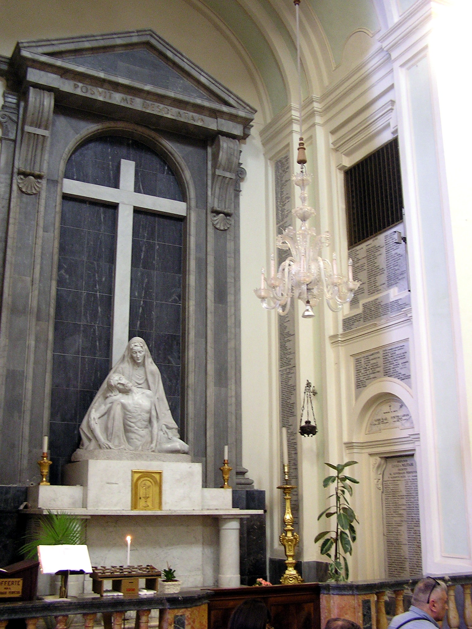 Ancona - Chiesa di San Domenico - Cappella dei caduti (architetto Eusebio Petetti) con statua della Pietà (Sanzio Blasi)